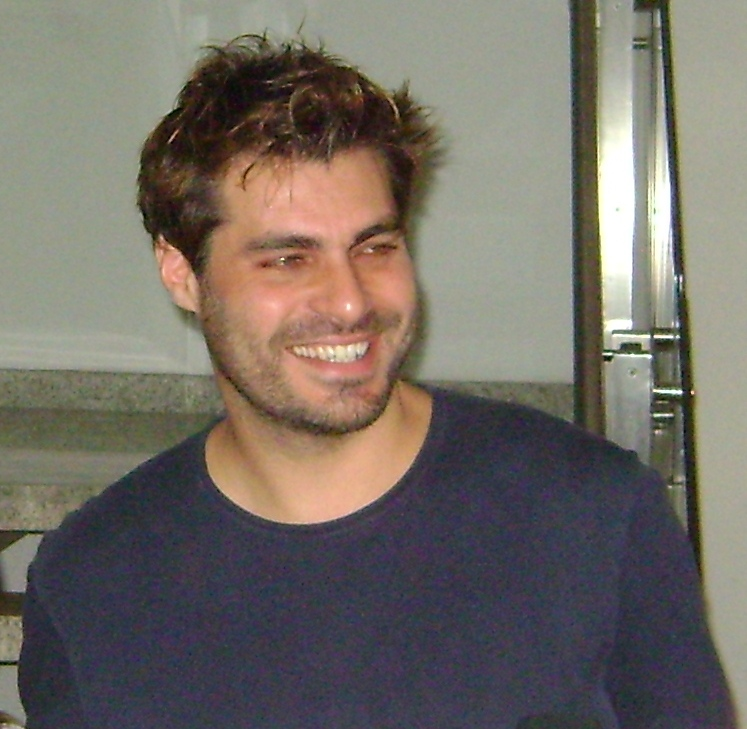 Thiago Lacerda, ator brasileiro, após a apresentação da peça "Calígula", em São Paulo.